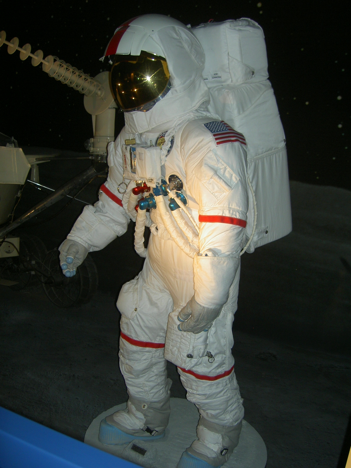 Space suit